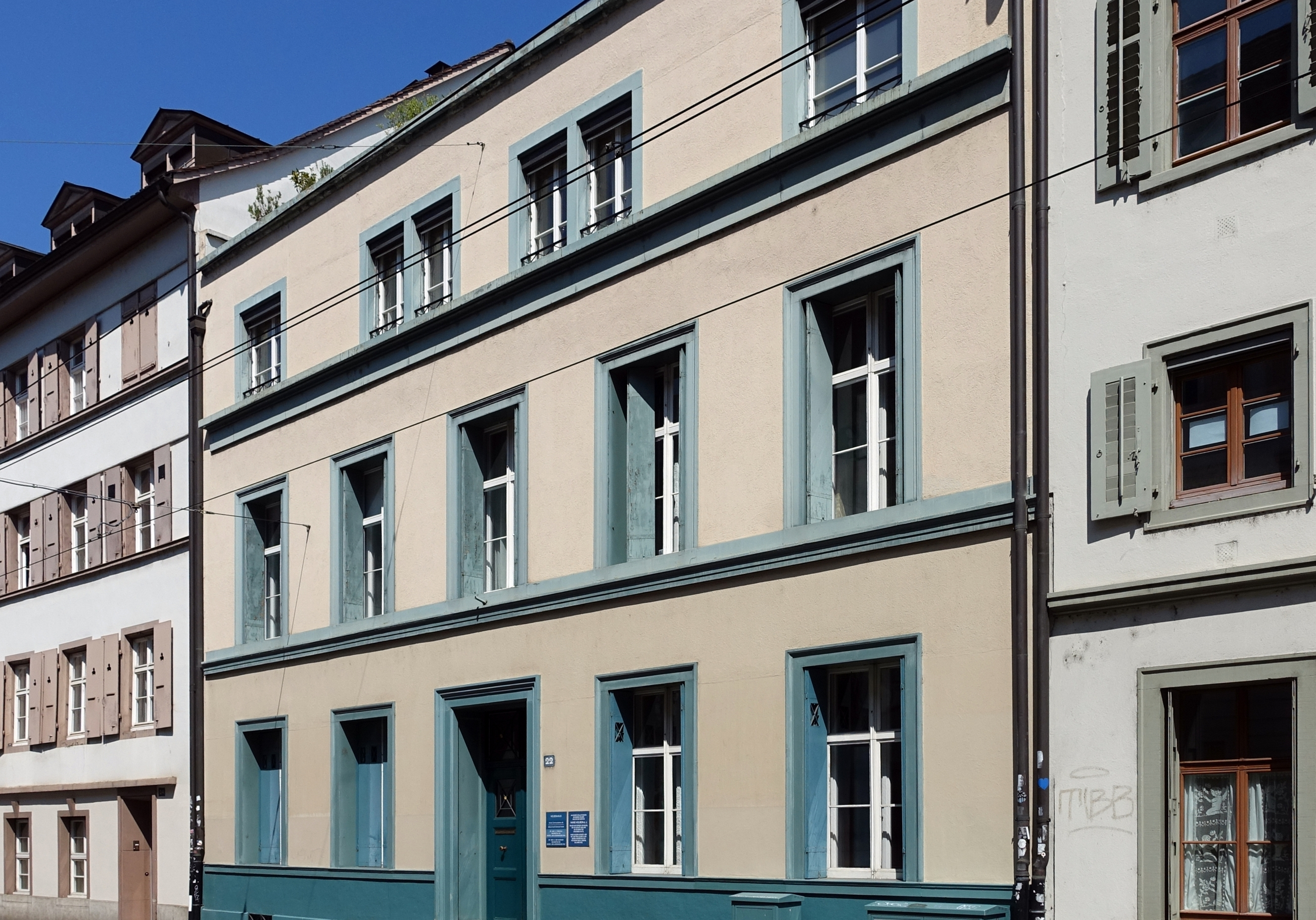 Wohnhaus 1528 und 1531 von Hans Holbein dem Jüngeren (1497/98–1543). St. Johanns-Vorstadt 22 in Basel.